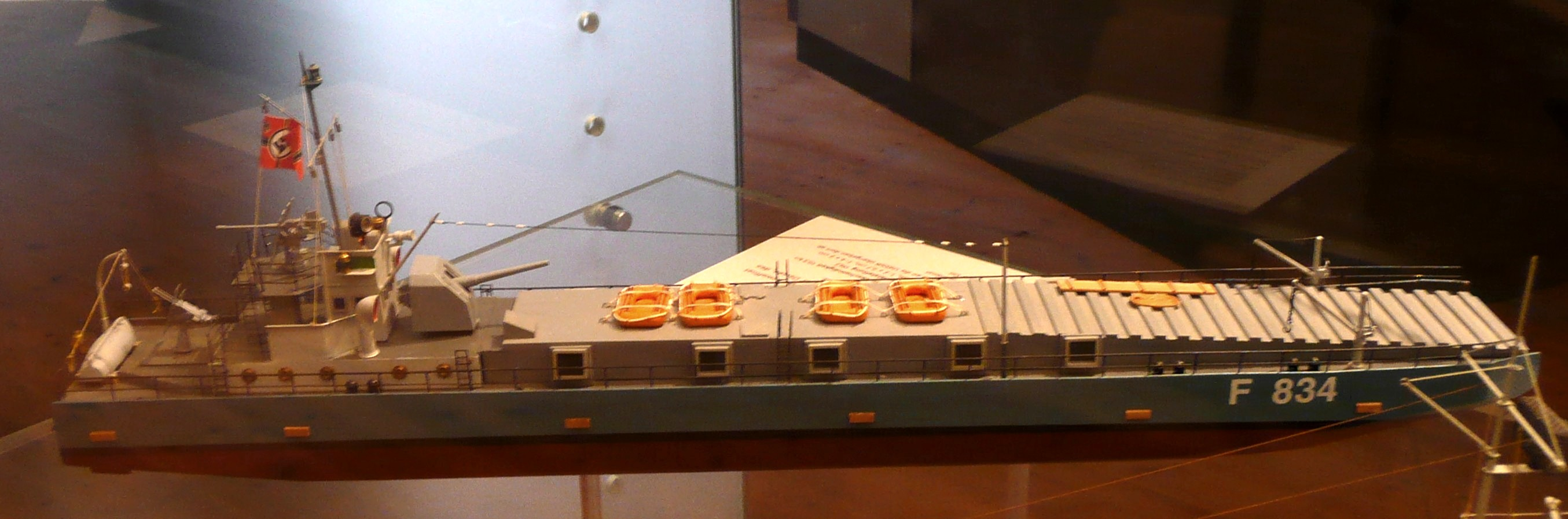 Modell im Maßstab 1:100 des Marinfährprahms Typ D 843. Ausgestellt im Internationalen Maritimen Museum Hamburg